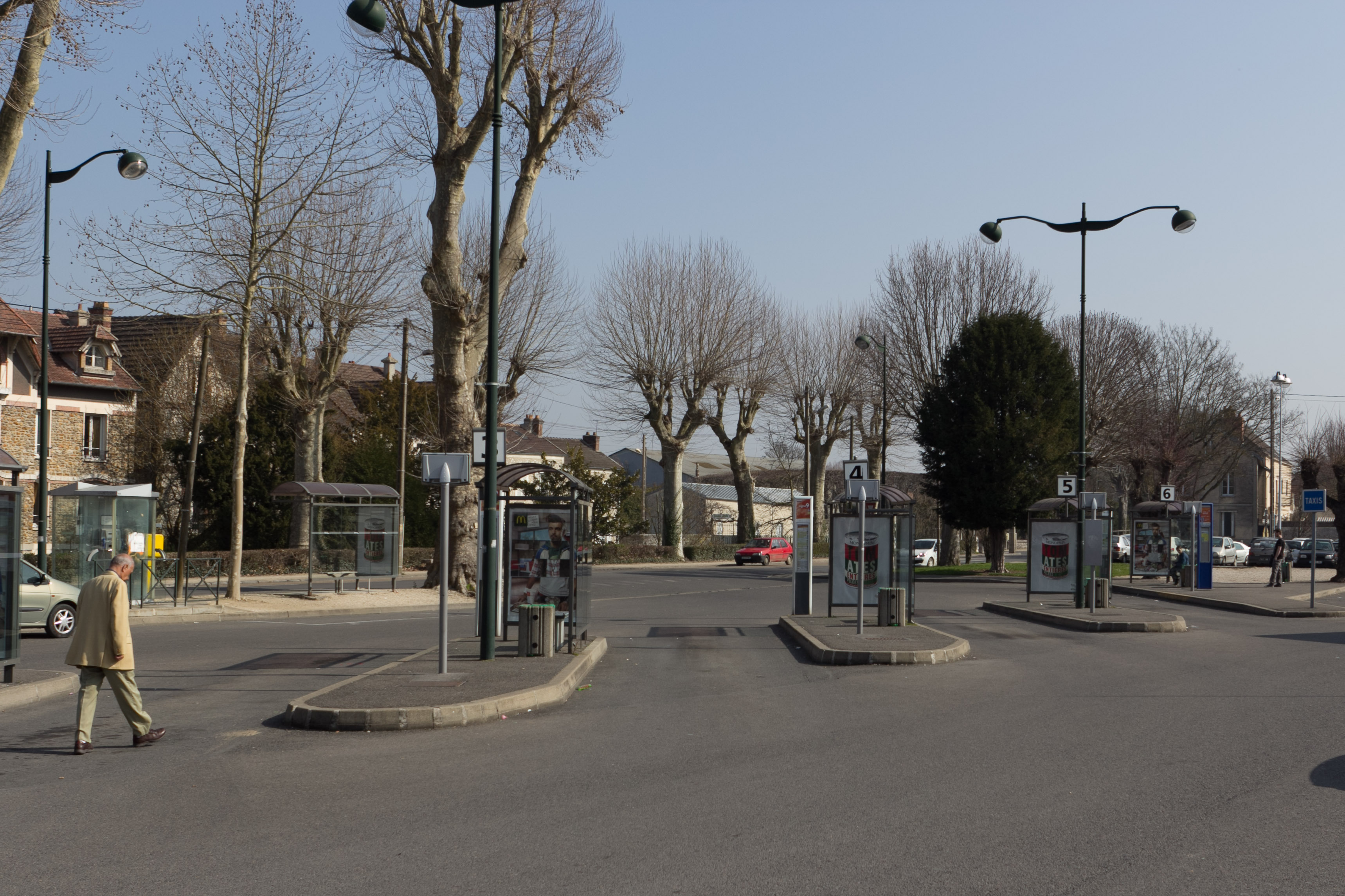 Gare routière de Provins, Provins, département de Seine-et-Marne, France